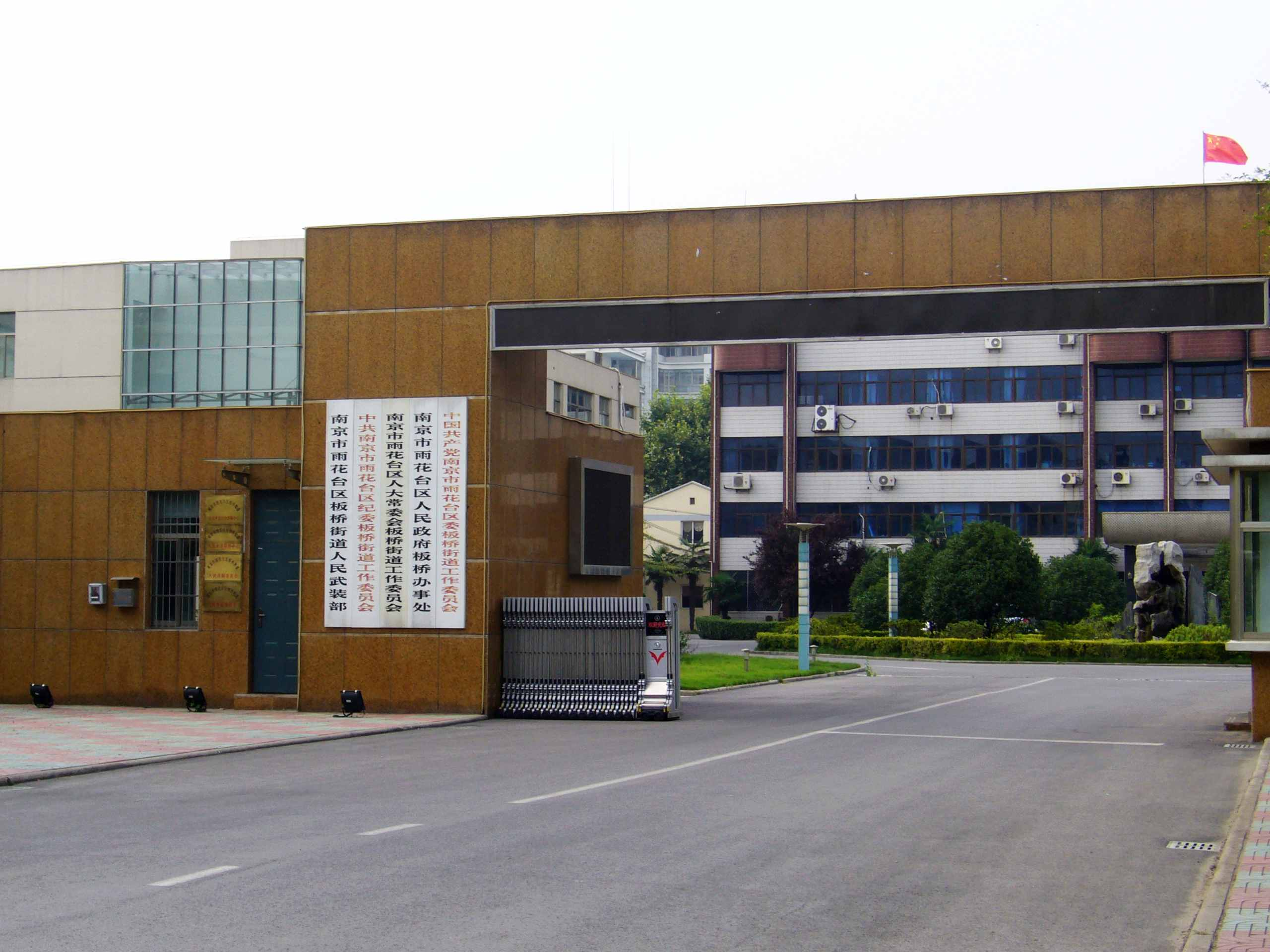 板桥街道办事处